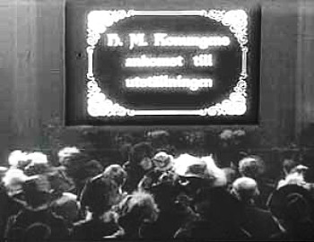 photos, sweden, konungens ankomst till Stockholmsutställningen 1897